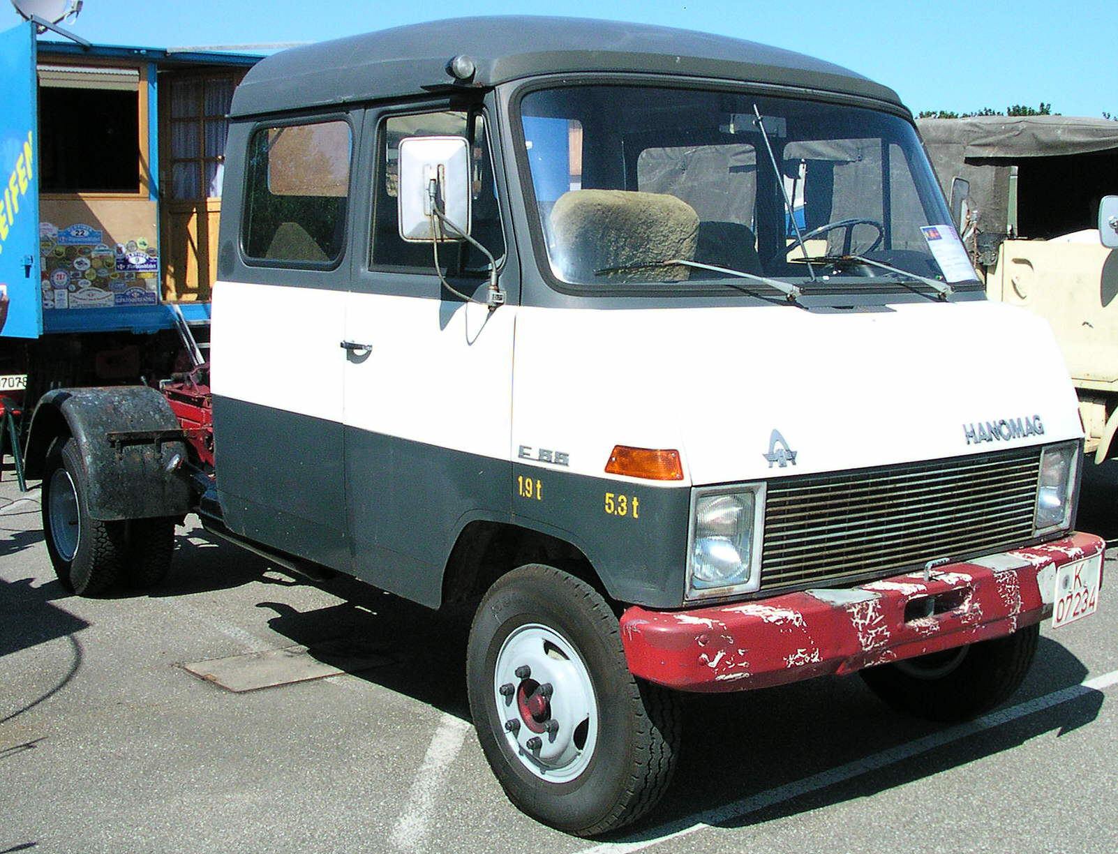 Wörth am Rhein, Oldtimer-Treffen bei Daimler-Chrysler Hanomag F 55 Doppelkabine, ehemaliges Bundesbahnfahrzeug, 59 kW